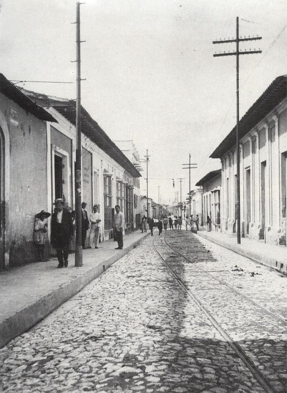 Fotografía a principios del siglo XX en la ciudad de Valencia (Venezuela)